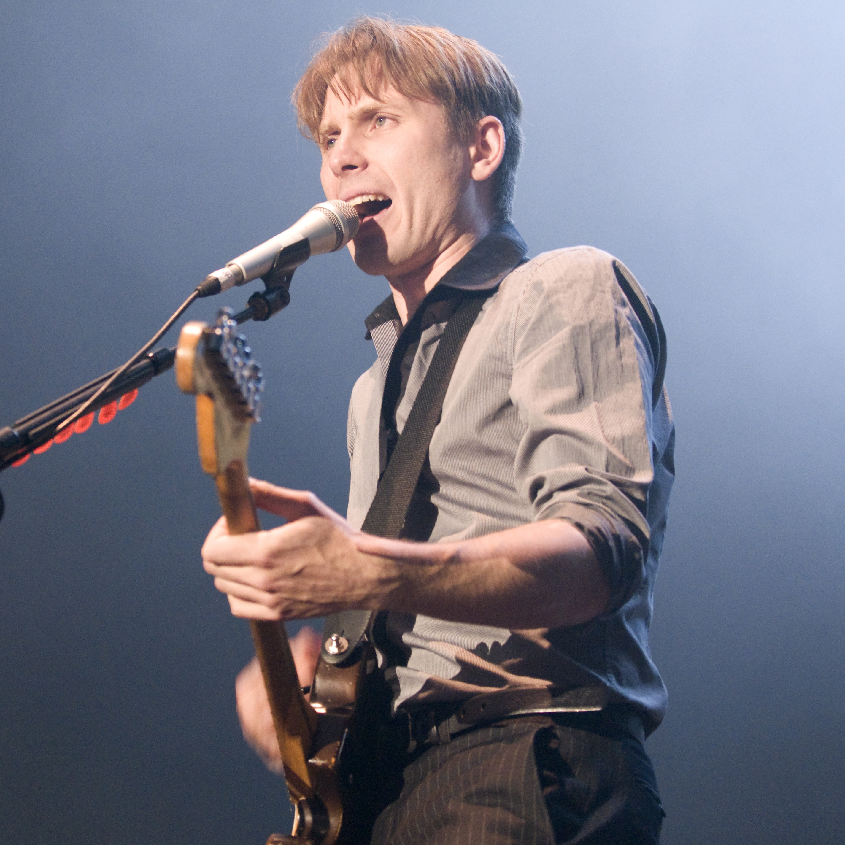 Square version of Franz Ferdinand (band) 2008.11.24 004.jpg